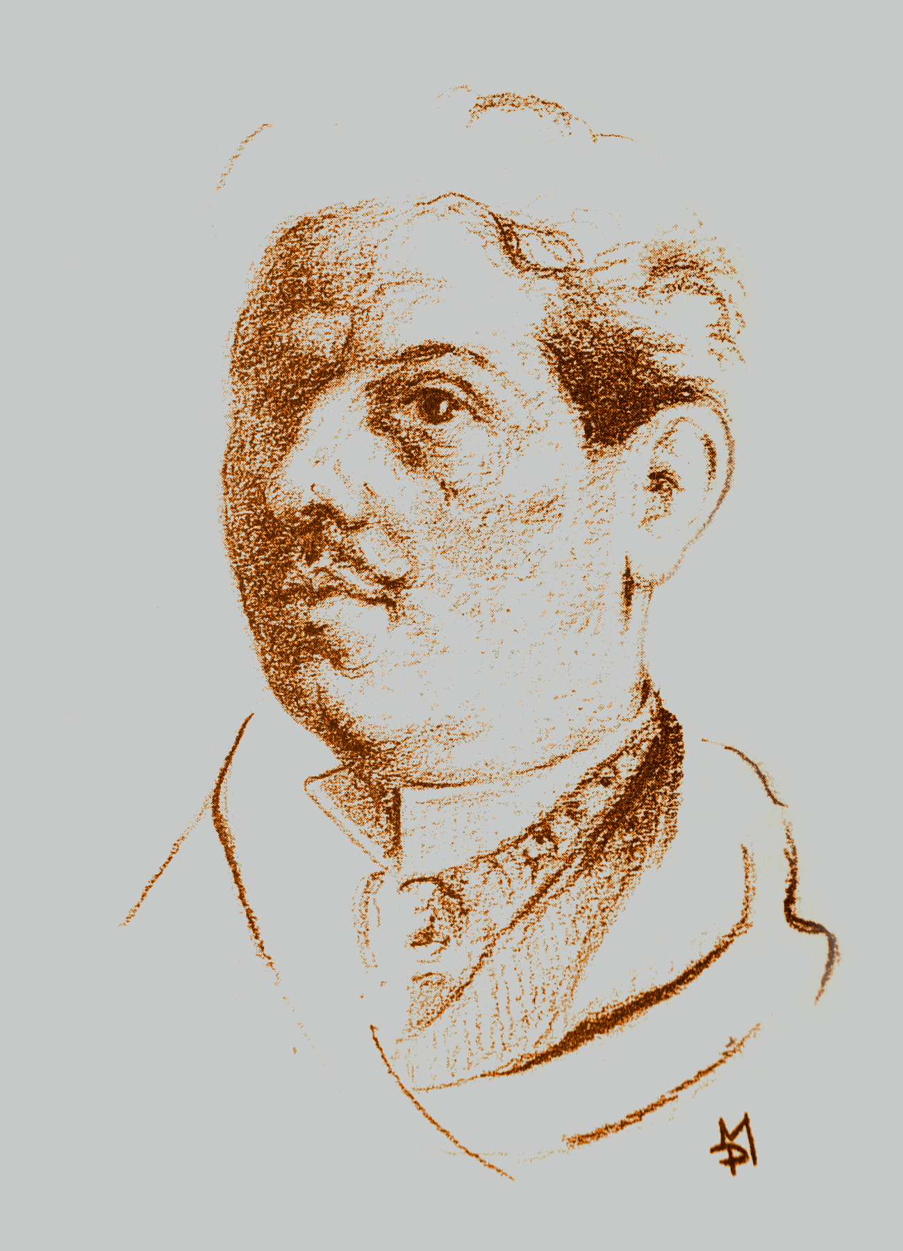 Miguel Pérez Reviriego. Retrato de Felipe Checa, 1995. Lápiz sobre papel. Publicado en Pérez Reviriego, Miguel (1996). Cien artistas de Extremadura. Badajoz: Carisma Libros. p. 84. ISBN 8488964110.